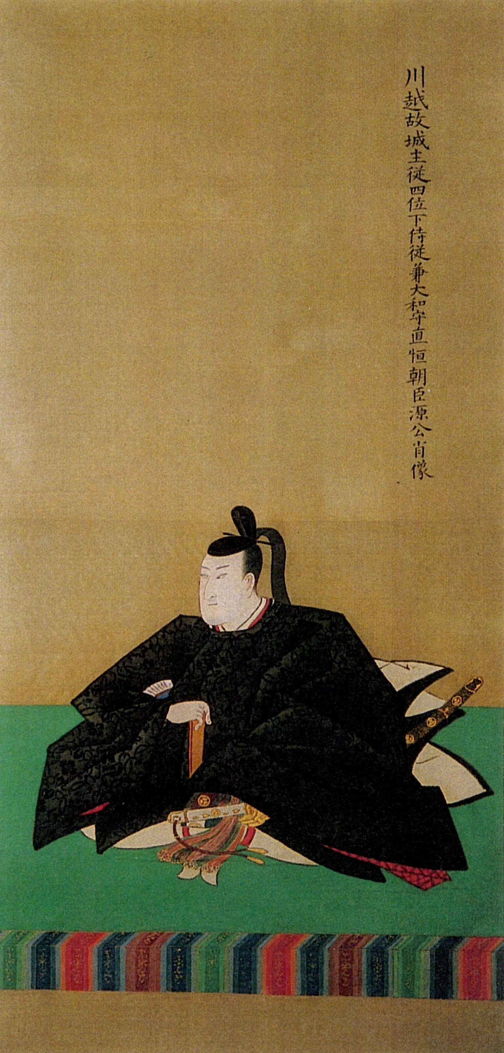 松平直恒の肖像。